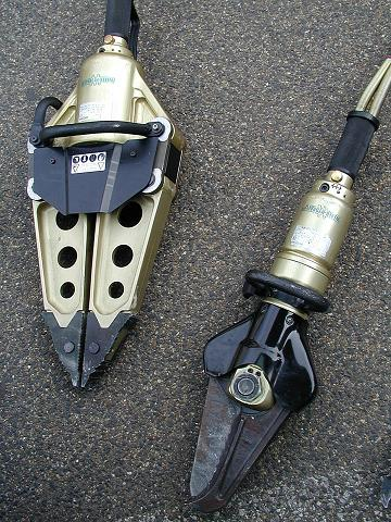 links: Spreizer, rechts: Rettungsschere. Eigene Aufnahme vom 3.10.2004. Lizenz: GNU-FDL Left: spreader, right: cutter